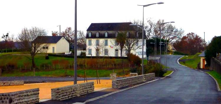 Mairie d'Aubertin